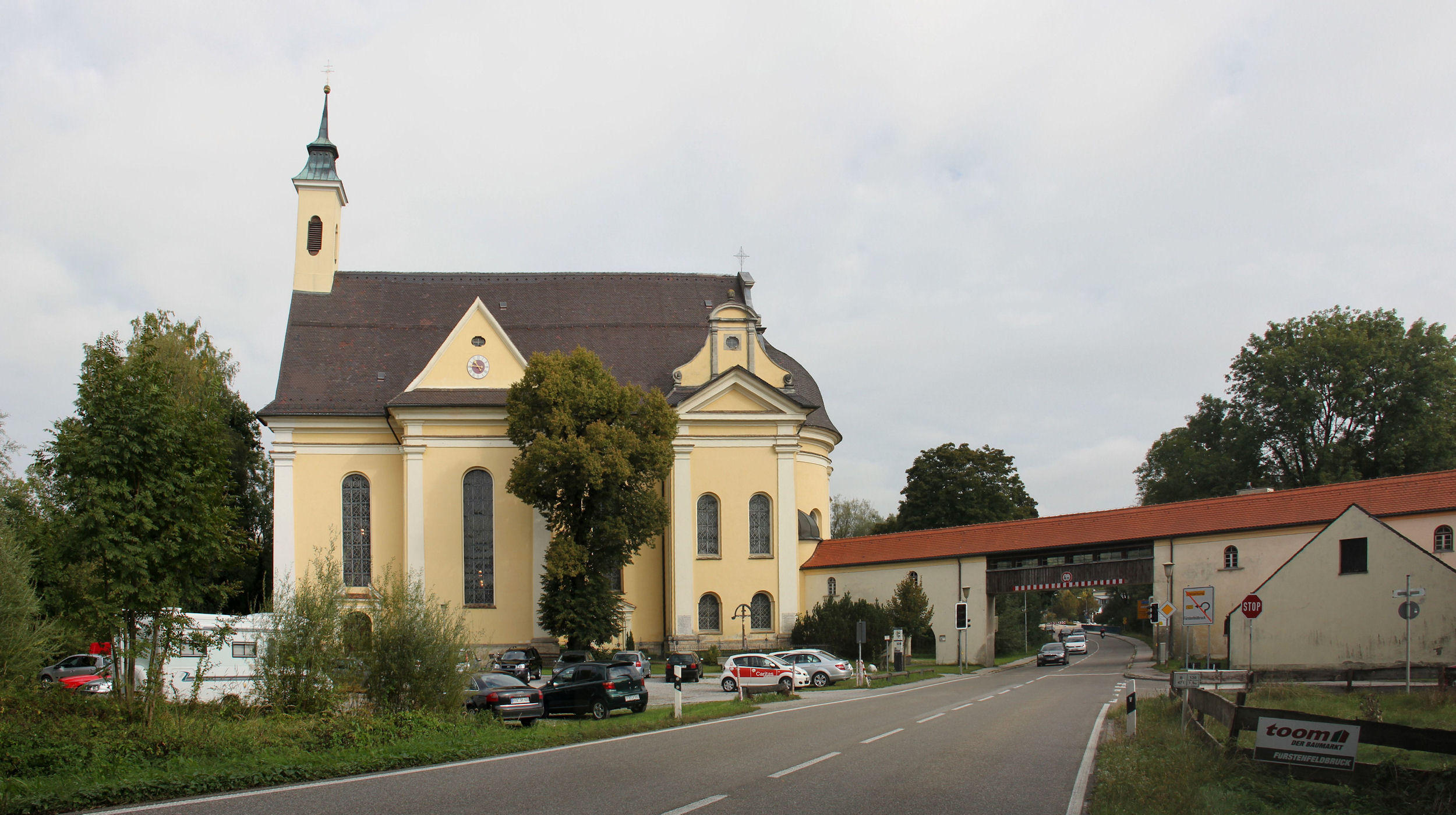 Church of St. Rasso Native nameSt. RassoLocationGrafrath, Upper Bavaria, GermanyCoordinates48° 07′ 17.04″ N, 11° 09′ 23.4″ E Authority control : Q2322972 GND: 4398453-8 institution QS:P195,Q2322972 Rechts im Bild der überdachte Verbindungsweg vom Konventsbau zur Kirche St. Rasso.